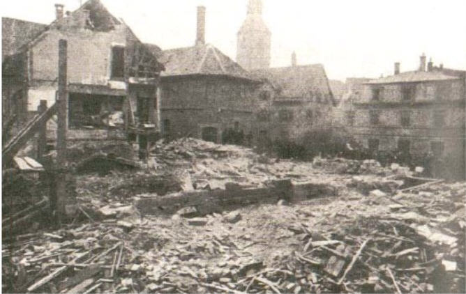 der nach einer Hebeaktion von Erasmus Rückgauer eingestürzte Gasthof Hirsch in Nagold